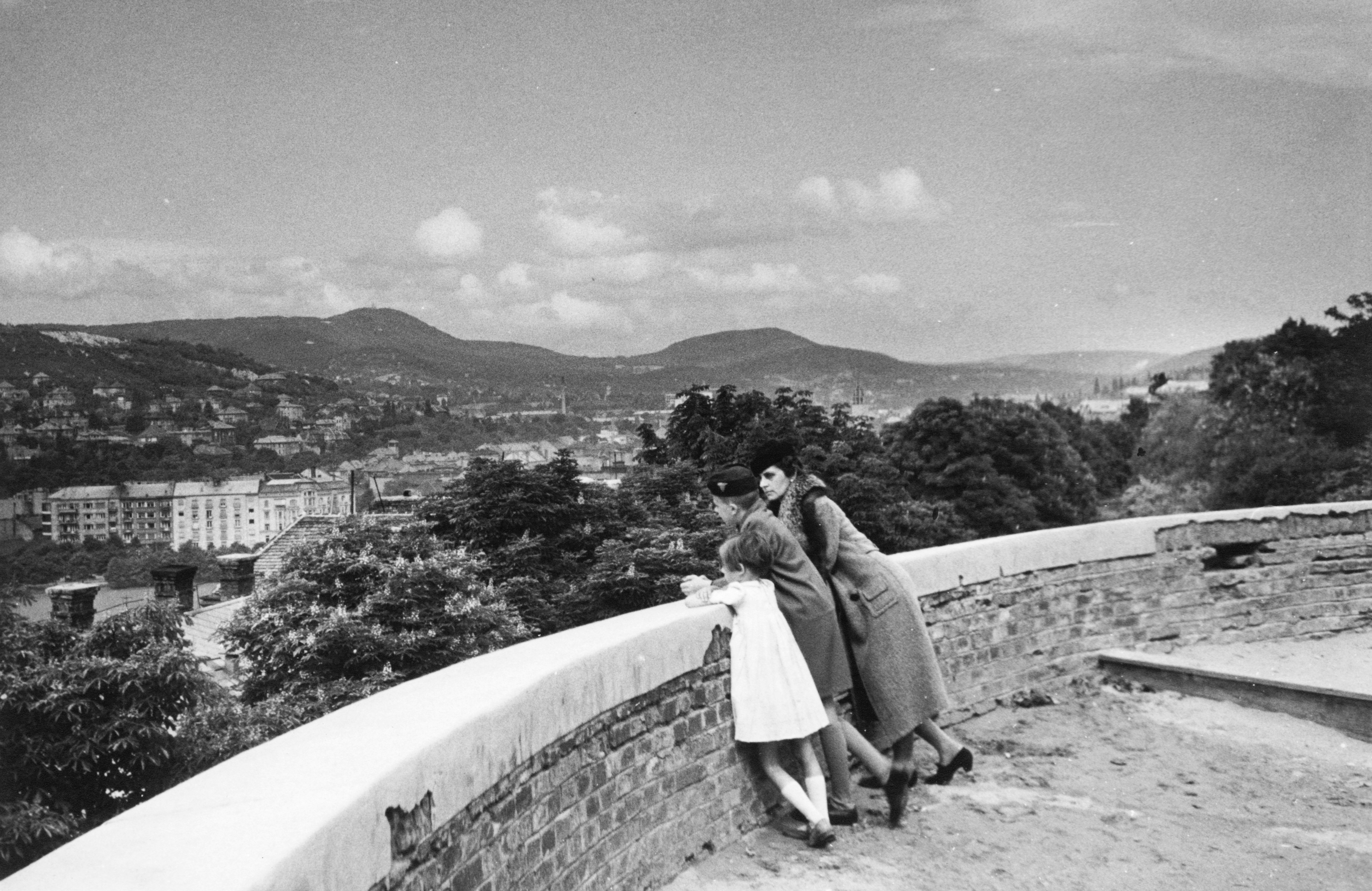 Budpest Tóth Árpád (Gróf Bethlen István) sétány, Savanyúleves rondella.